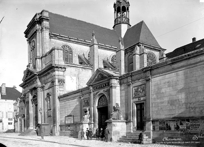 Vue d'ensemble de la chapelle du collège des Jésuites de Chaumont par Séraphin-Médéric Mieusement.